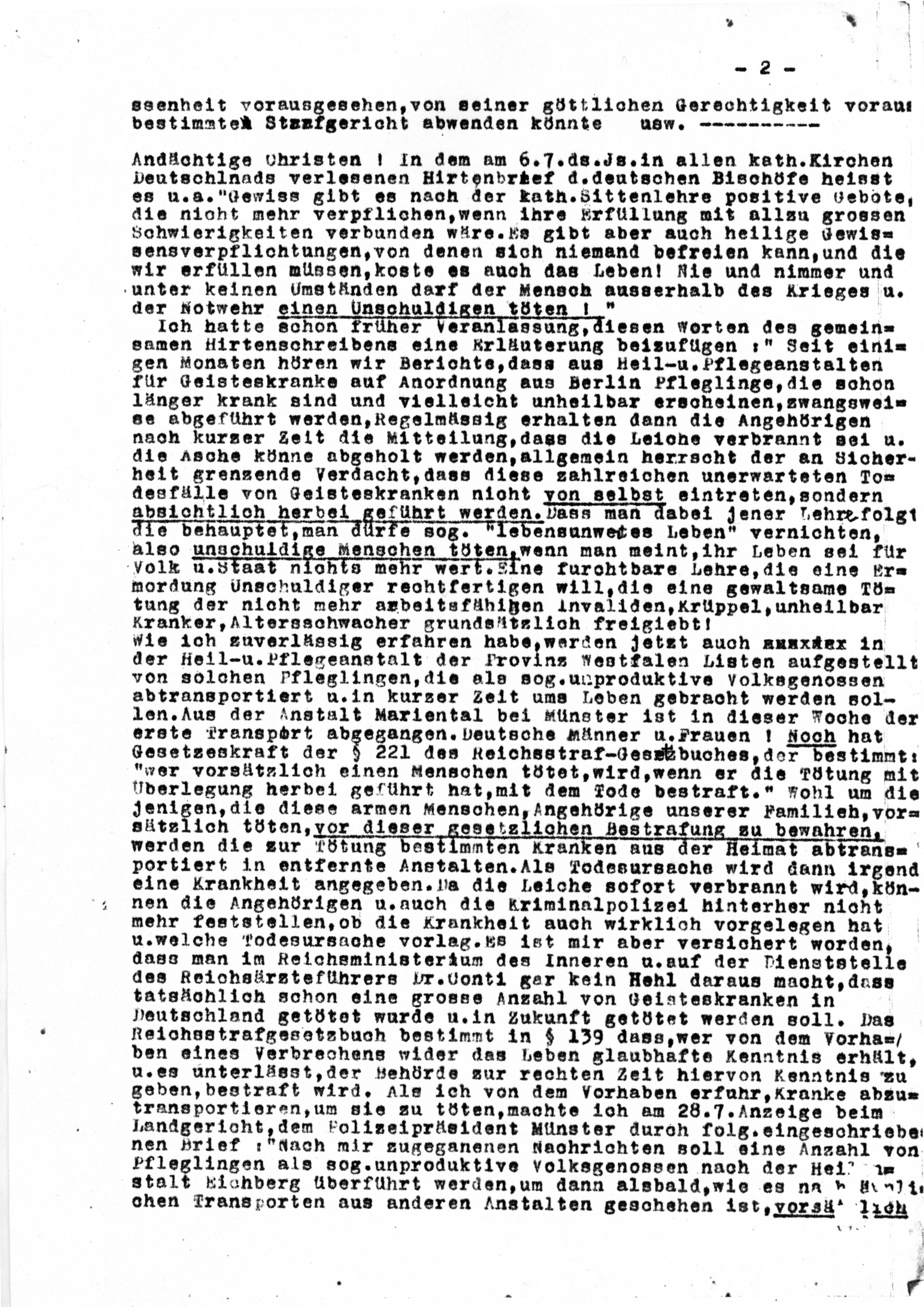 Seite 1 der Abschrift einer Predigt des Bischofs von Münster vom 3. August 1941 wie sie damals vielfach in katholischen Kreisen kursierte. Diese ist die Kopie von einem Original, das ich 1998 im Privatarchiv eines alten katholischen rheinländischen Pfadfinders (DPSG), der einer während der NS-Zeit illegalen Gruppe angehörte, einsehen konnte.